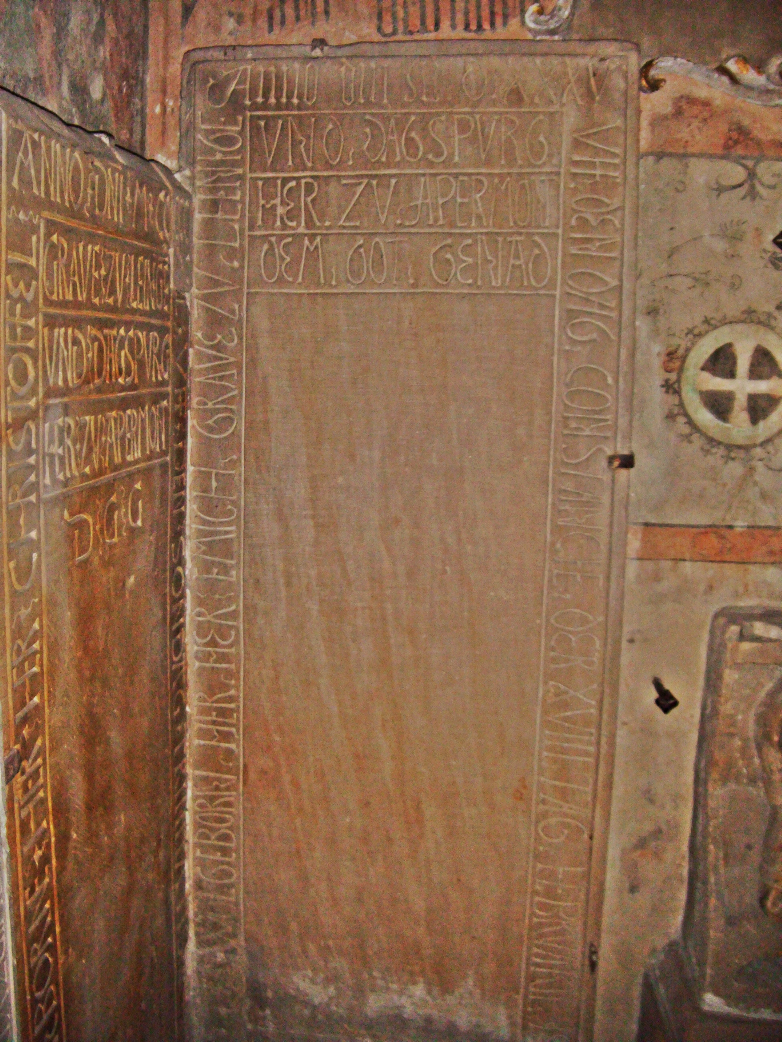 Schlosskirche Bad Dürkheim, Leininger Grabkapelle, Epitaph Graf Emich IX. von Leinigen-Hardenburg (+ 1535), Erbauer der Kapelle, daneben Weihekreuz